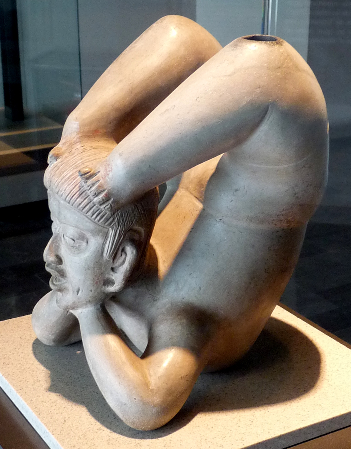 Vasija de cerámica en forma de acróbata, encontrada en el sitio arqueológico de Tlatilco del Estado de México, en el entierro 154 del templo IV (expuesta en el Museo Nacional de Antropología de México).